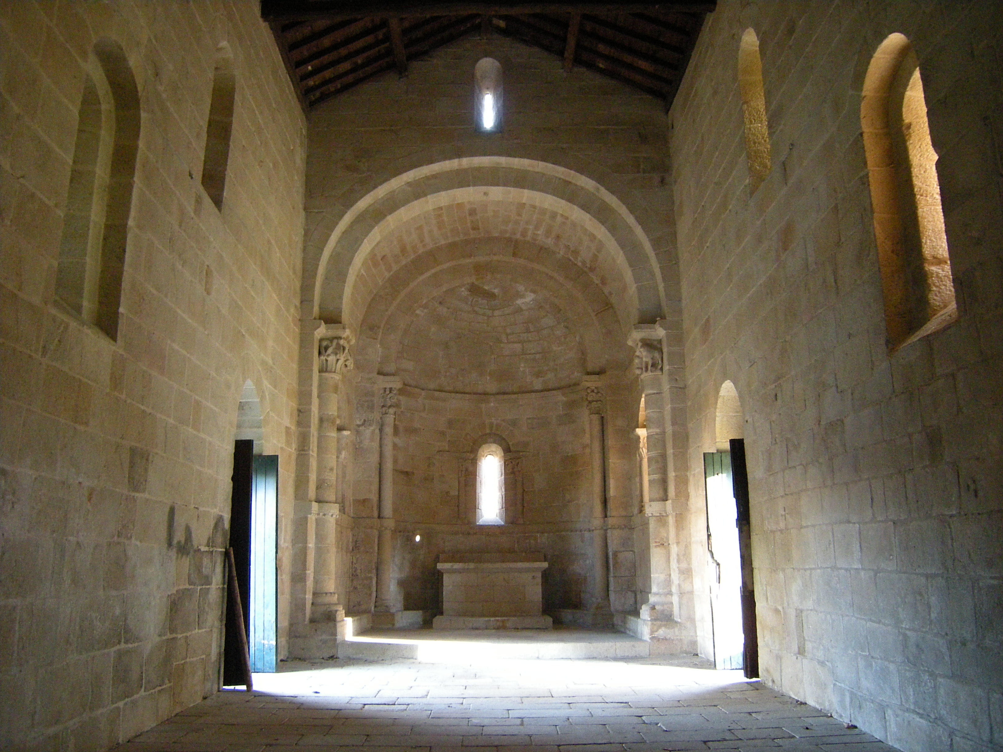 Interior da igreja vista desde o chão da nave.